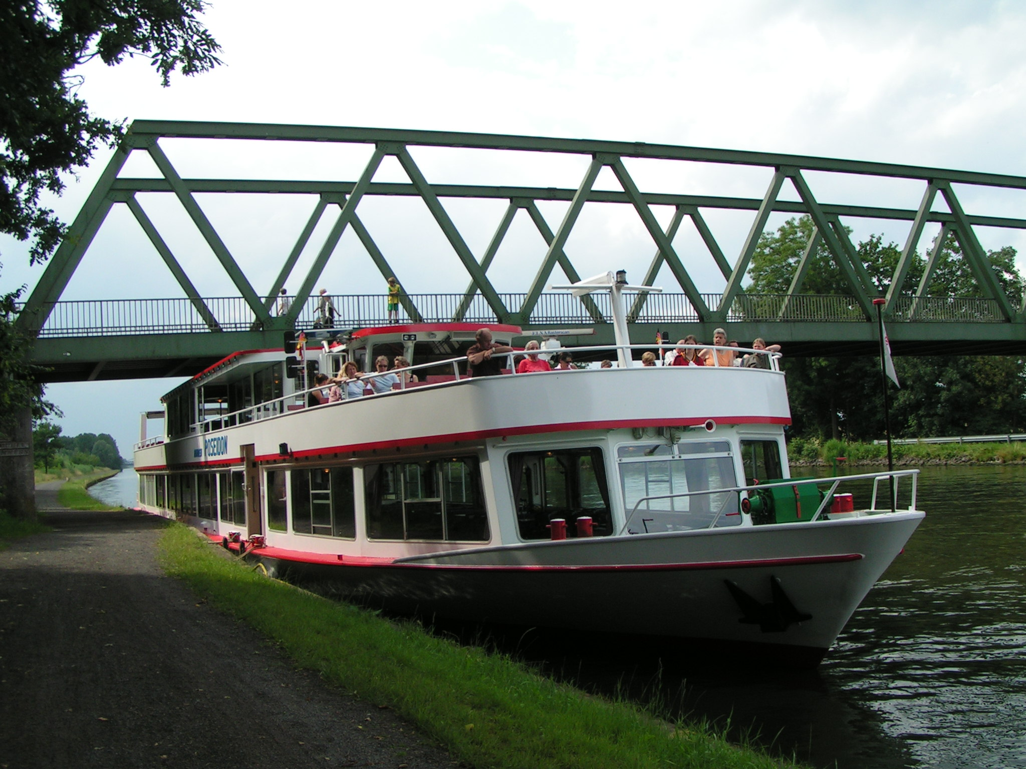 Fahrgastschiff Poseidon am Anleger Hille-Südhemmern (Kreis Minden-Lübbecke, Nordrhein-Westfalen) am Mittellandkanal.